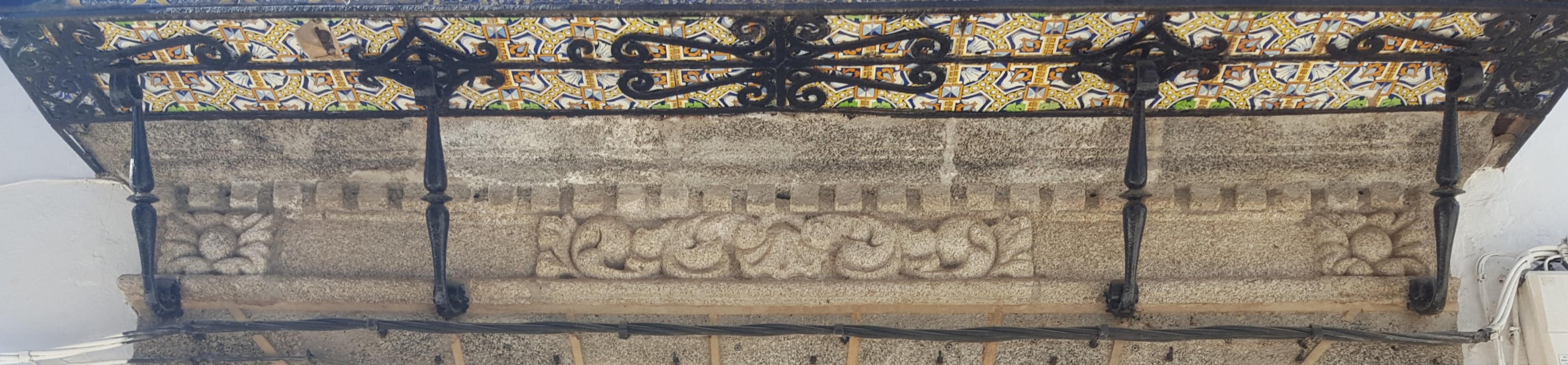 Relieve en piedra de José Barragán que corona la puerta de acceso a la vivienda n.º 7 de la calle "la Cárcel" de Fregenal de la Sierra (Badajoz). Q60481908 (1914–2009) DescriptionSpanish art educator and sculptorDate of birth/death 3 March 1914 9 November 2009Location of birth/death Fregenal de la Sierra MadridWork period1927 / 1996Authority control : Q60481908 creator QS:P170,Q60481908